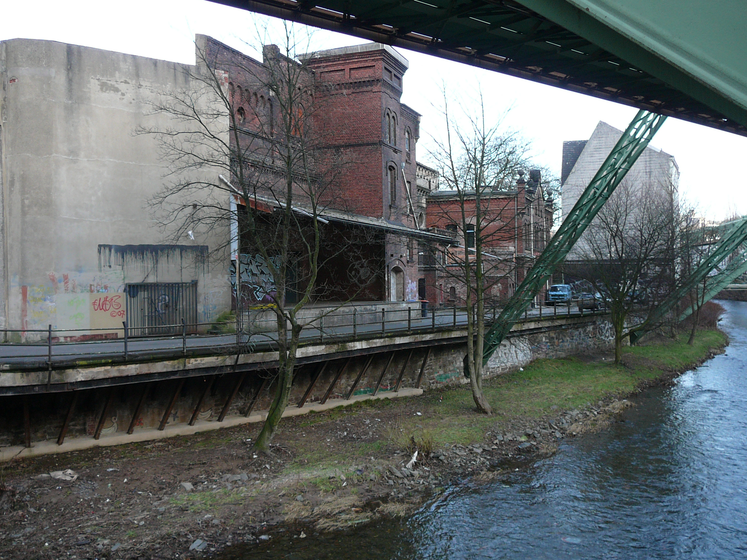 Friedrich-Ebert-Str., Wuppertal